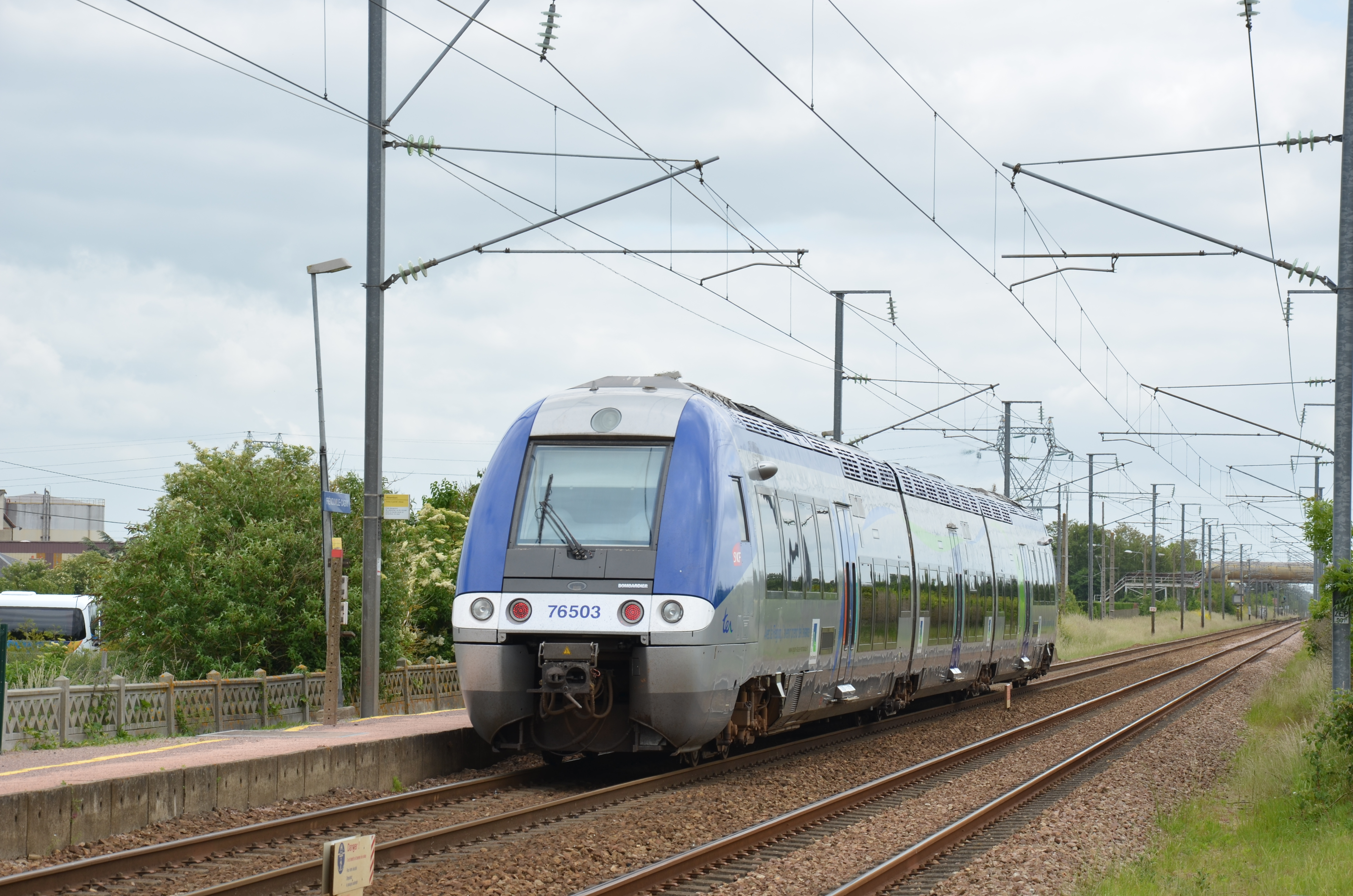 X 76503 en gare de Frénouville-Cagny, sur la liaison Caen-Lisieux (train n°852338).